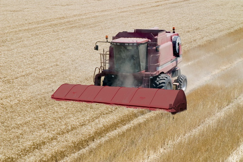 Żniwiarka oczesująca